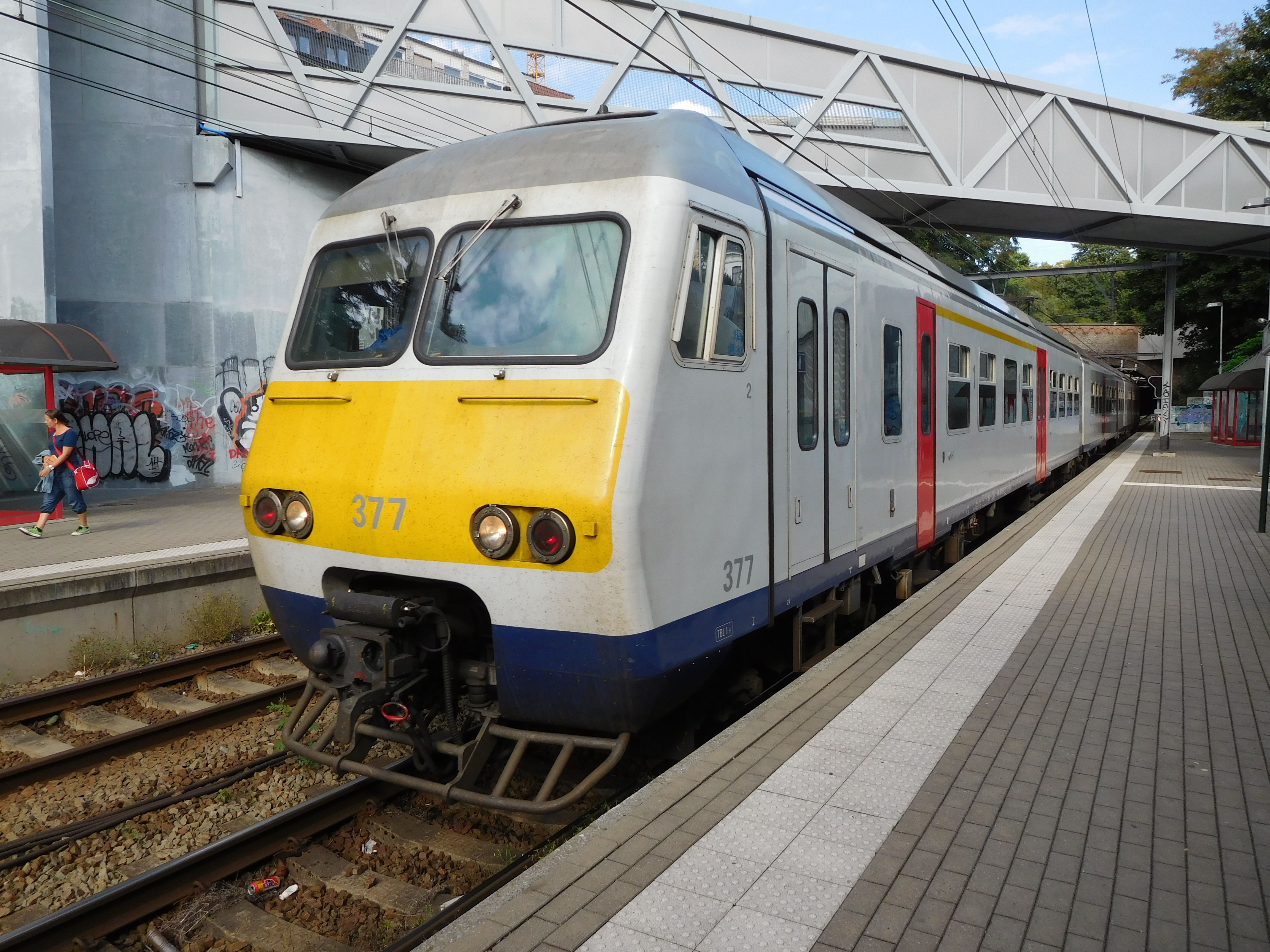 AM377 arrivant en gare de Vivier d'Oie sur un train S9 vers Braine-l’Alleud